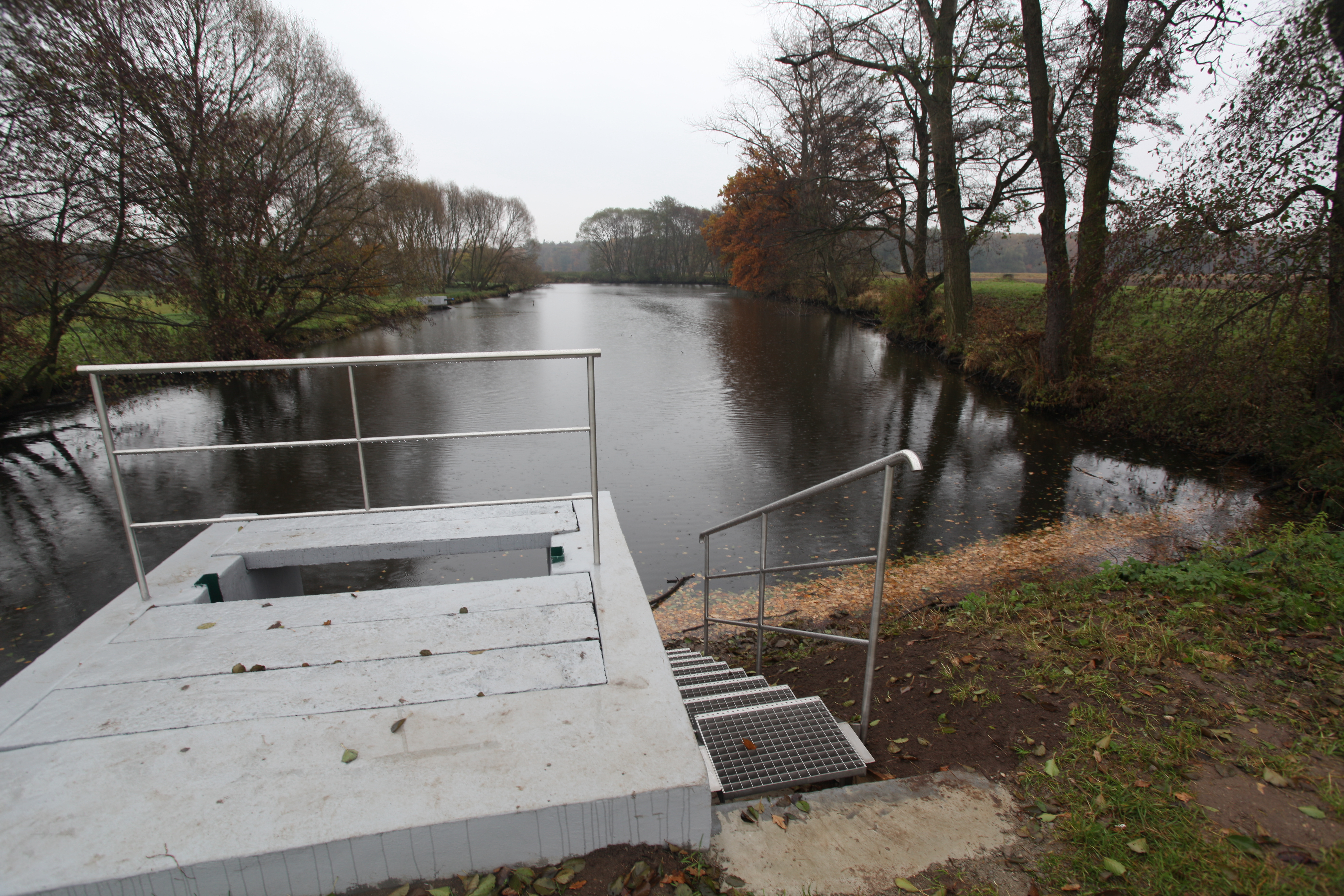 V kalové laguně se usazují shluky dvojmocného železa. Dochází tak k čištění prací vody, která je používána k čištění pískových rychlofiltrů v odželezovně artéské vody v úpravně vod v Káraném. Jednou za 3 dny je potřeba pískový filtr jedné ze šesti van odželezovny vyčistit od usazených vloček dvojmocného železa. Proces propírání filtru spočívá nejprve v provzdušnění a rozmíchání filtru tzv. pracím vzduchem. To je zajištěno přiháněním vzduchu zespoda. Následuje prací voda, která vytlačí špinavou vodu do kanálků mezi vanami. Propírání probíhá tak dlouho, dokud do kanálků nezačne přepadat pouze voda. Z kanálků pokračuje voda s železem do suterénu odželezovny, kde se rozdělí na hustší frakci odváděnou na kalovou lagunu a řidší frakci, která se opětovně vrací odželeznění. Na kalové laguně na břehu řeky Jizery poté vločky dvojmocného železa sedimentují a voda je odváděna zpět do řeky. Jednou za několik let je třeba kalové sedimenty v laguně vytěžit. Sedimenty jsou podrobeny rozboru a následně skládkovány. V Káraném se takto upravuje pouze artéská voda ze 7 vrtů umístěných východně od obce, protože tato voda obsahuje zvýšené množství trojmocného železa obsaženého v solích. Označení artéská voda pochází z francouzské provincie Artois, kde byla obdobná voda čerpána mnichy kartuziánského řádu ve 12. století. Voda do Polabí přitéká propustnými pískovci shora od Ještědského hřbetu. Rychlost je však malá, stáří vody bylo odhadnuto na 14 000 let. Tyto propustné pískovce jsou v okolí Káraného o mocnosti 20-30 m a nacházejí se v hloubce 60-80 m. Jsou překryty nepropustnými slínovci. Voda odtékající z kalové laguny se jako odpadní voda pravidelně kontroluje. Zdroje: Křivánek, Oldřich a Kněžek, Miroslav. 2001. Zdroje pitné vody v Káraném. Principy získávání vody v oblasti káranské vodárny. Pražské vodovody a kanalizace a.s. Wikipedie Ambrožová, Jana. 2007. Aplikovaná a technická hydrobiologie. VŠCHT